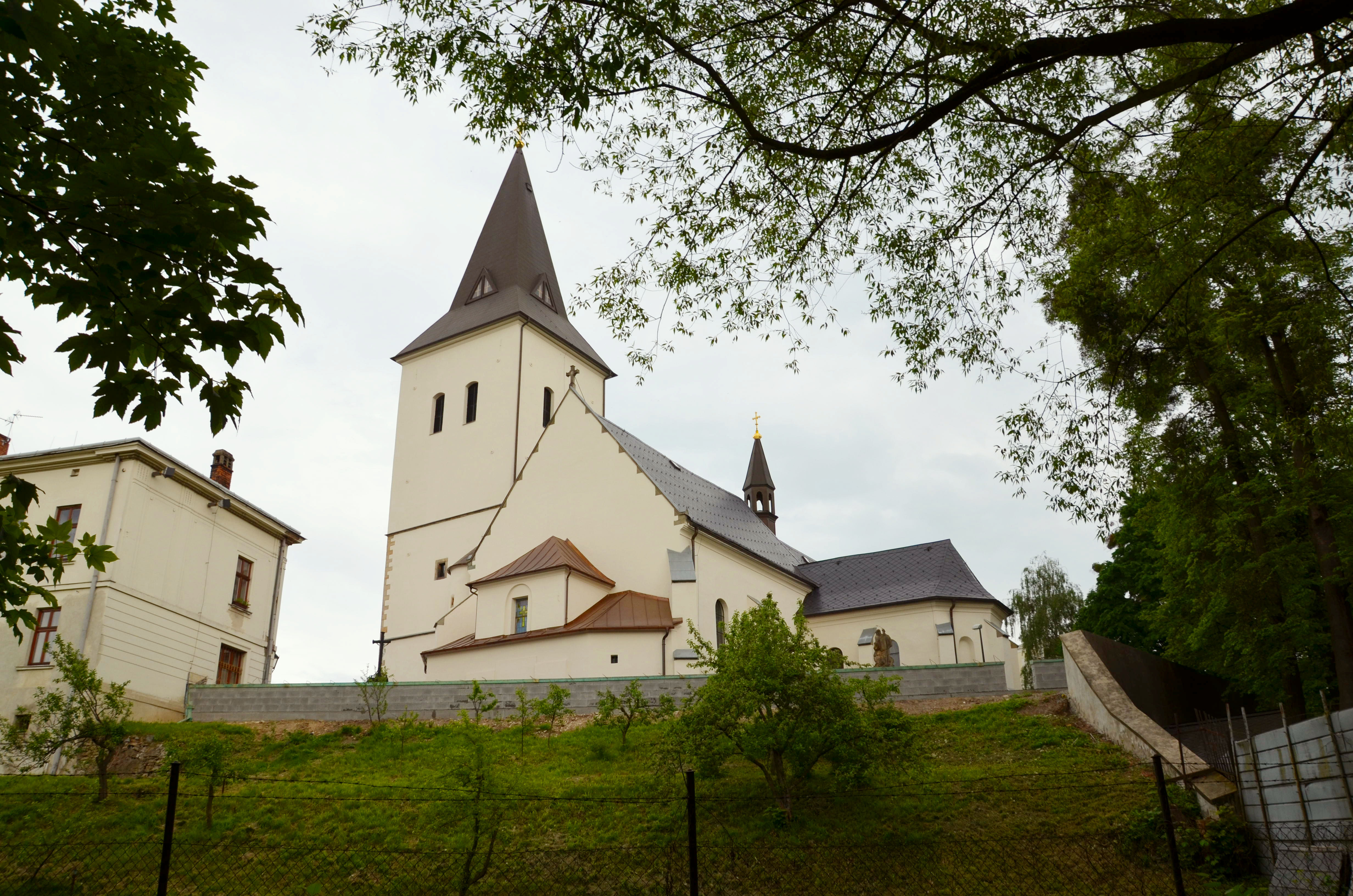 Jihozápadní pohled